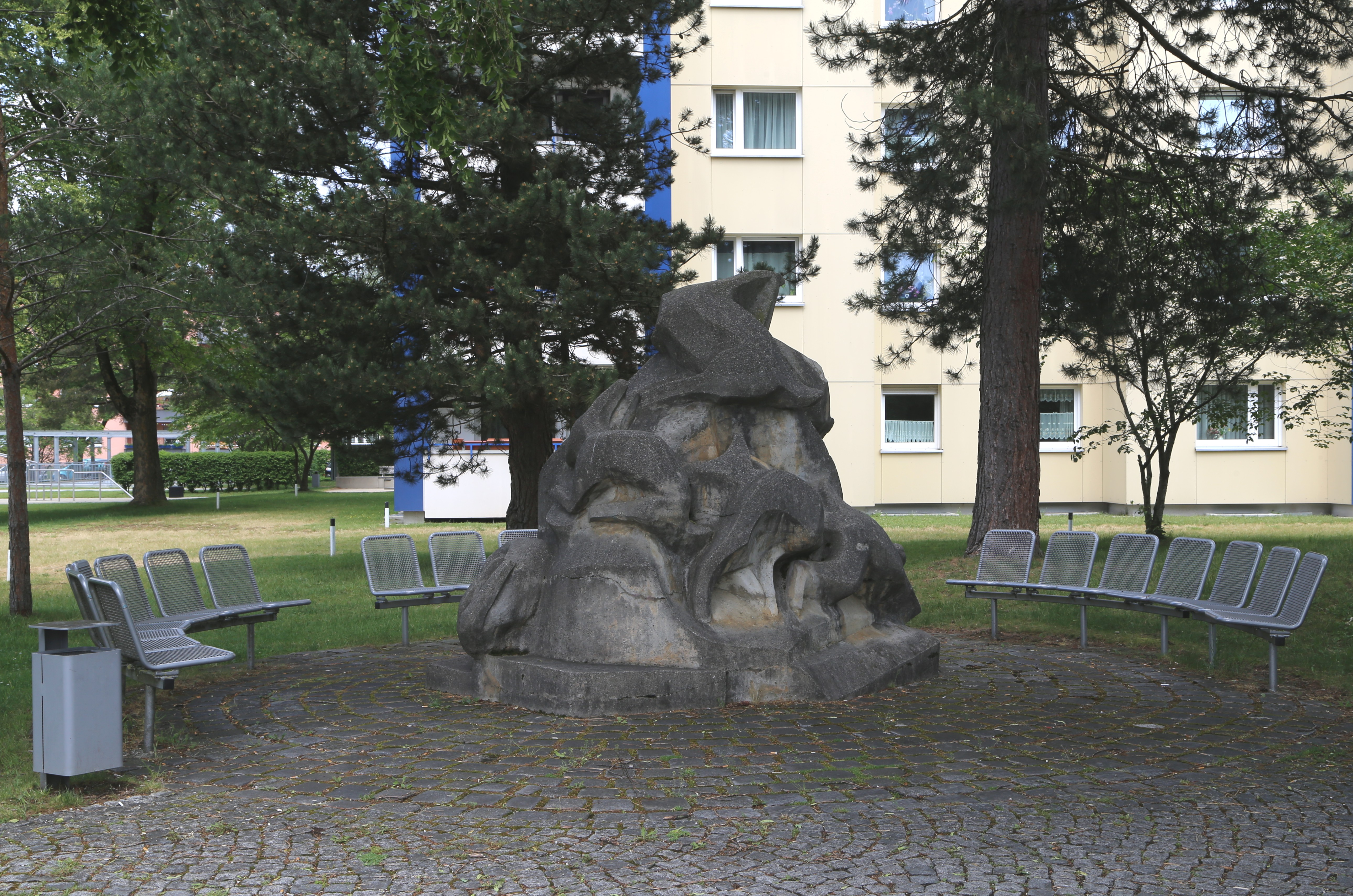 Hasenbergldenkmal am Goldschmiedplatz, Hasenbergl, München